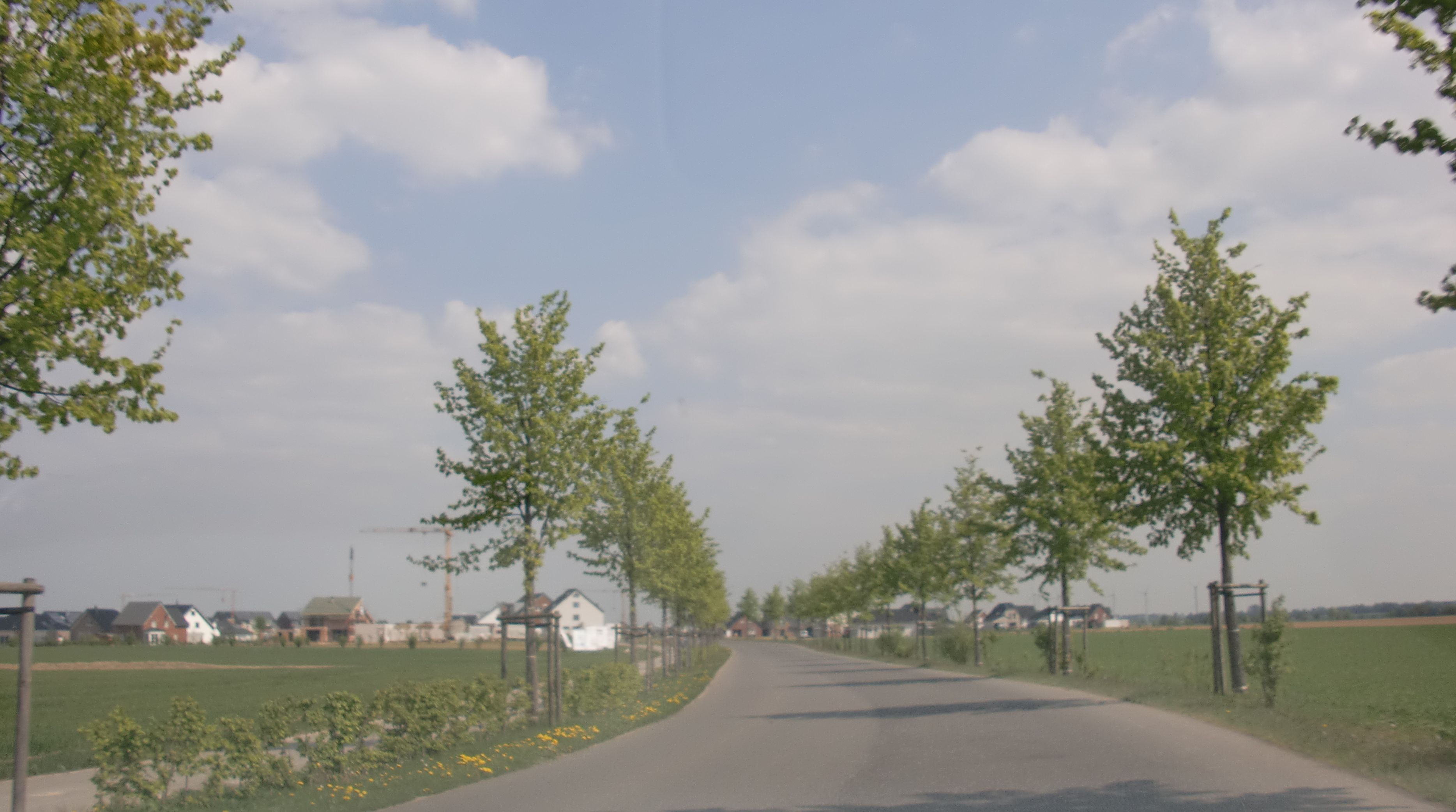 Ortseingang von Neu-Immerath 2011